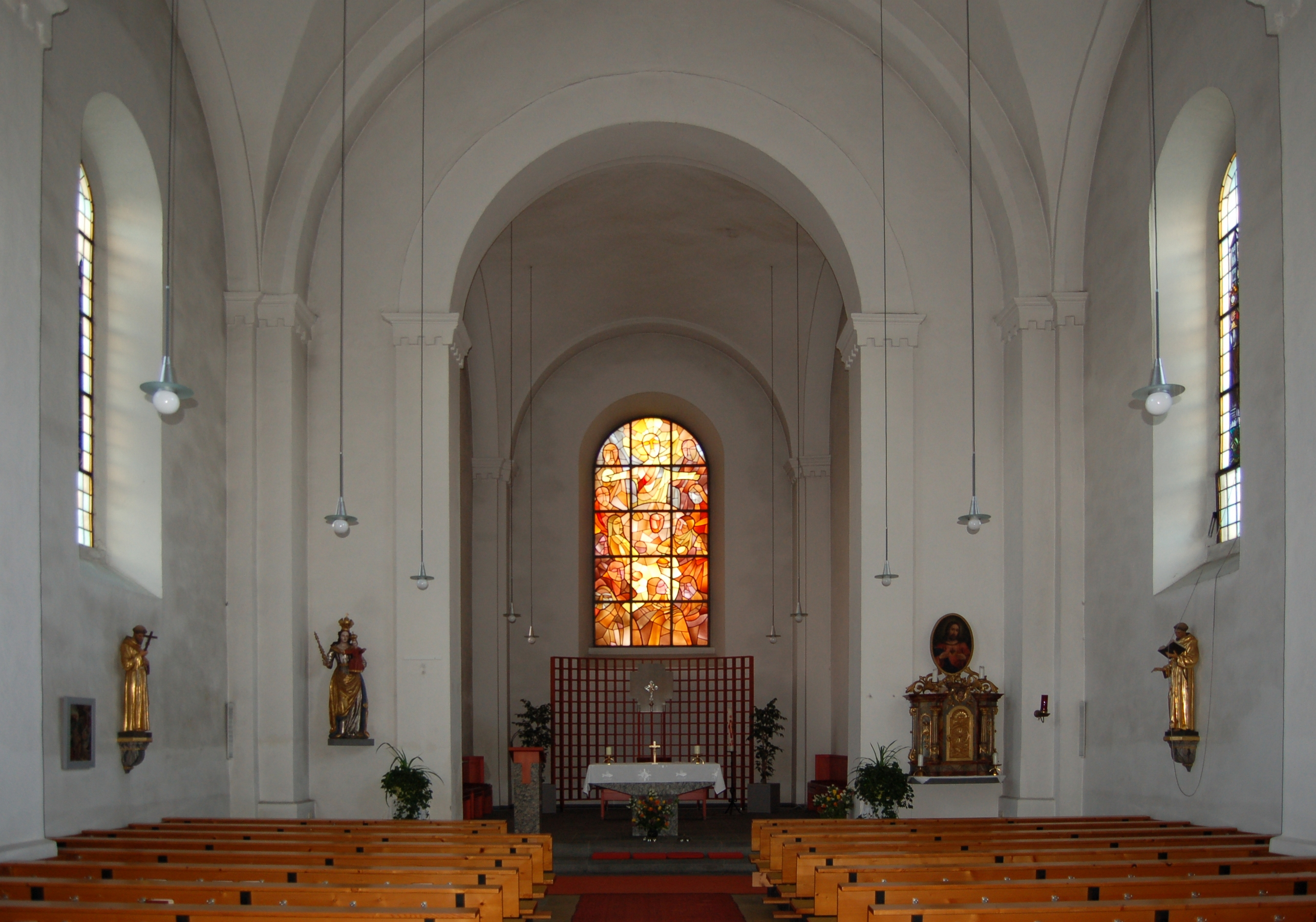 Die denkmalgeschützte Pfarrkirche in Arnreit, Bezirk Rohrbach (Oberösterreich). Blick auf den Chor.